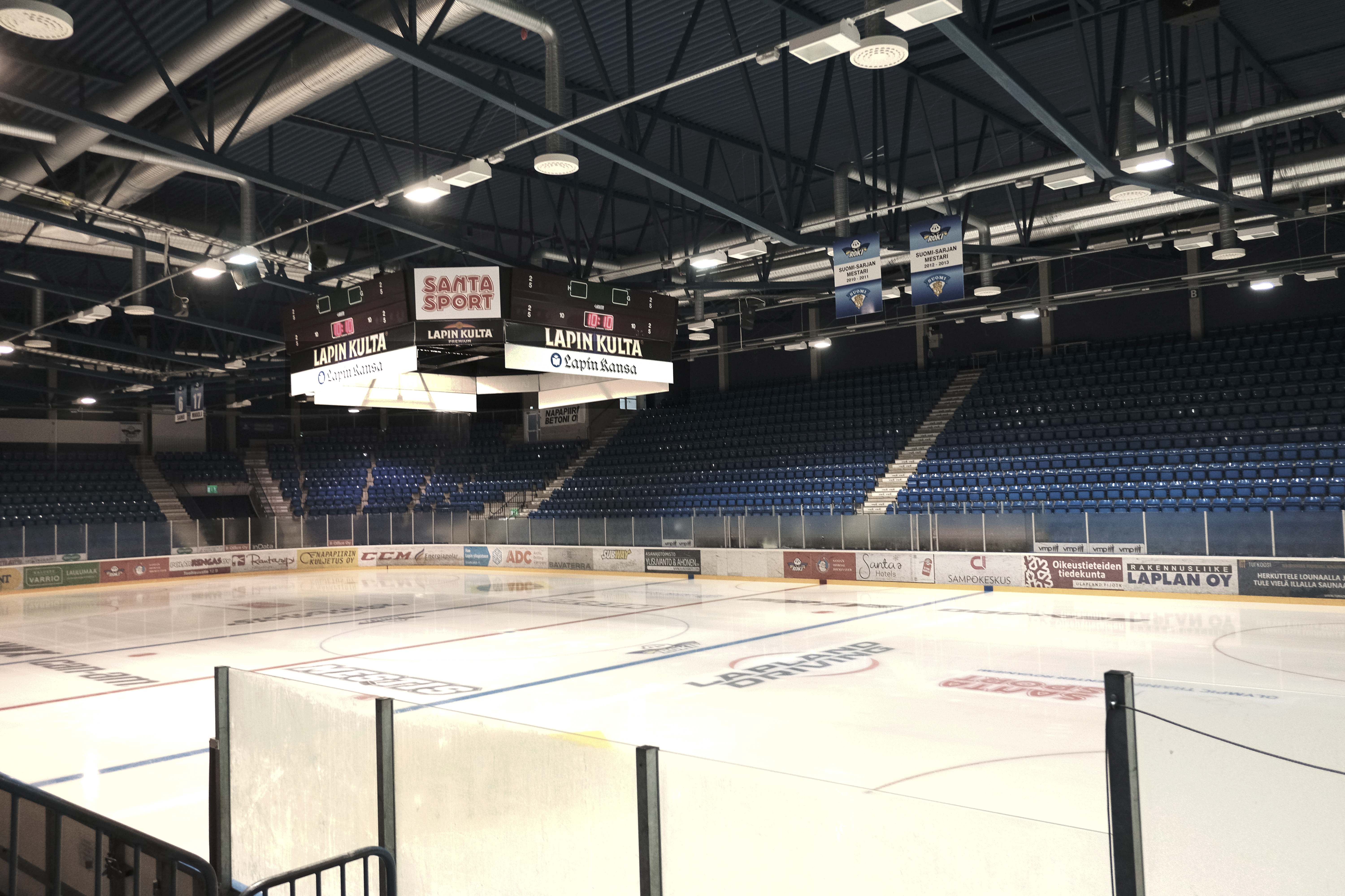 Lappi Areenan kisahalli sisältä.